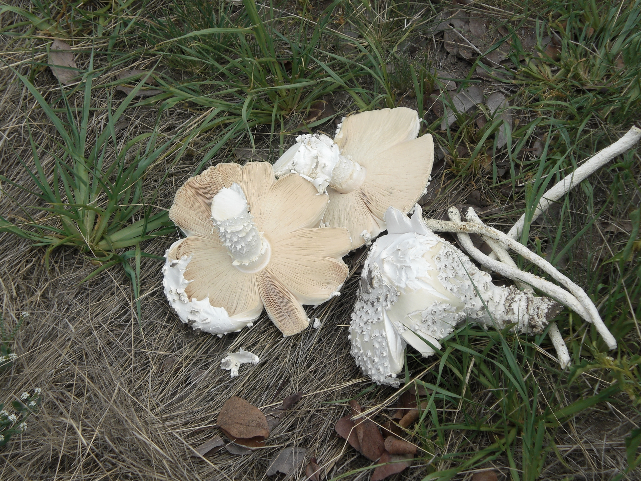 Omayova, Termitenpilz